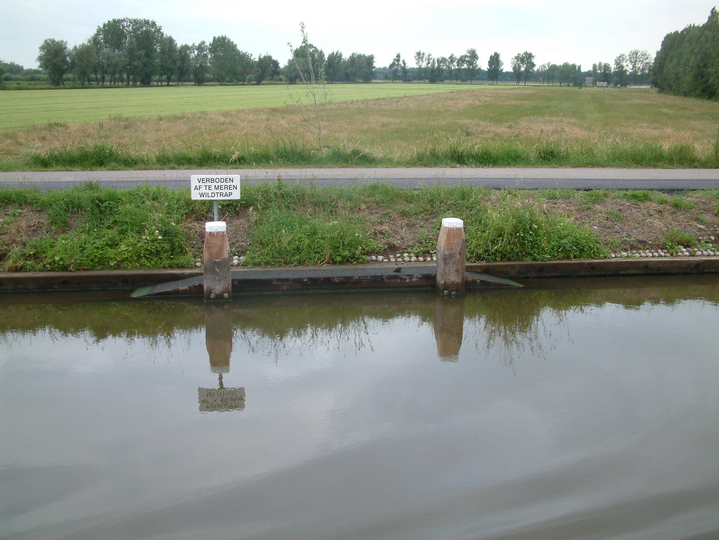 Een wildtrap in het Merwedekanaal bij Meerkerk. Deze voorziening redt vele te water geraakte dieren die op trek zijn, op zoek naar een nieuw territorium.